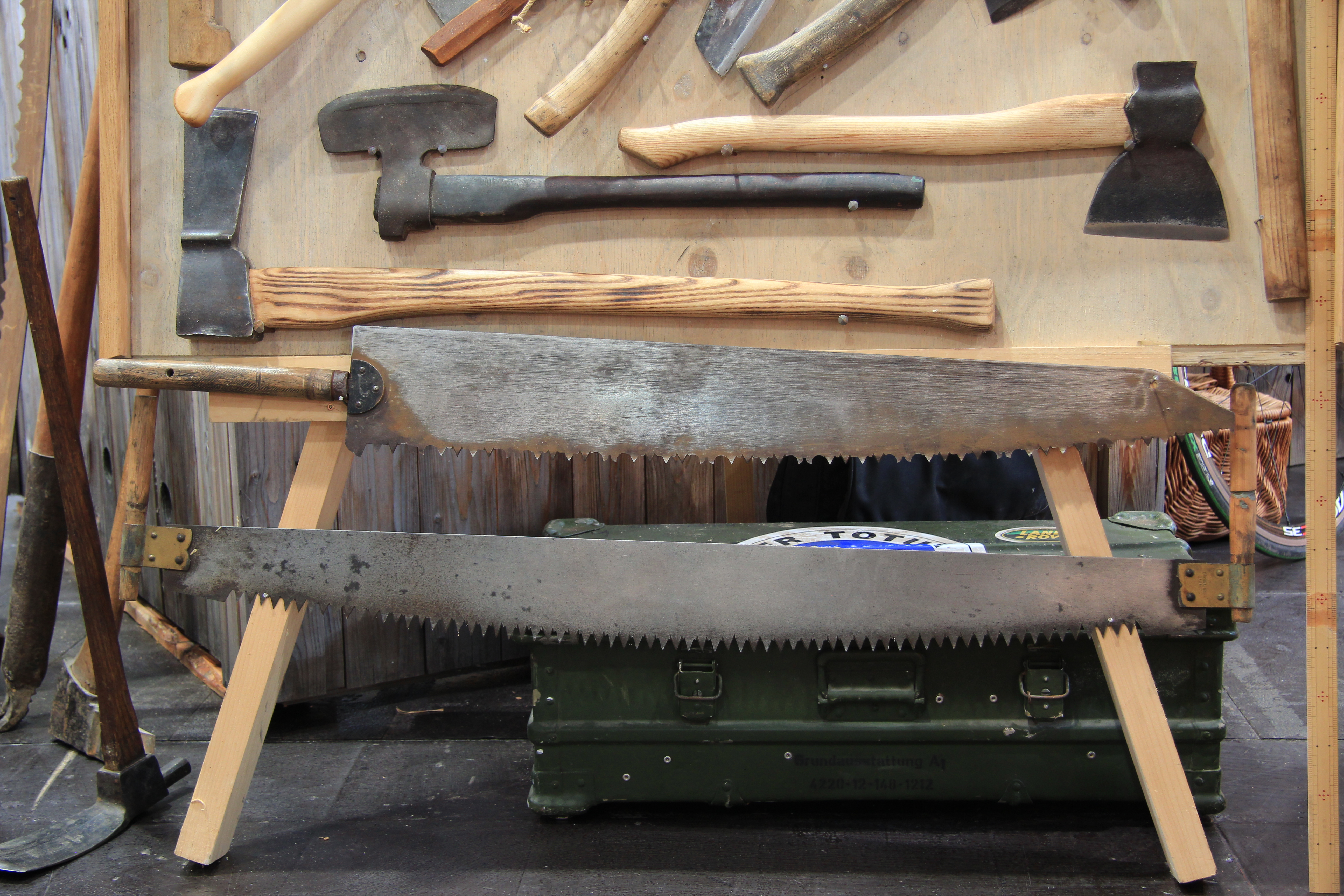 alte Zimmermannswerkzeuge